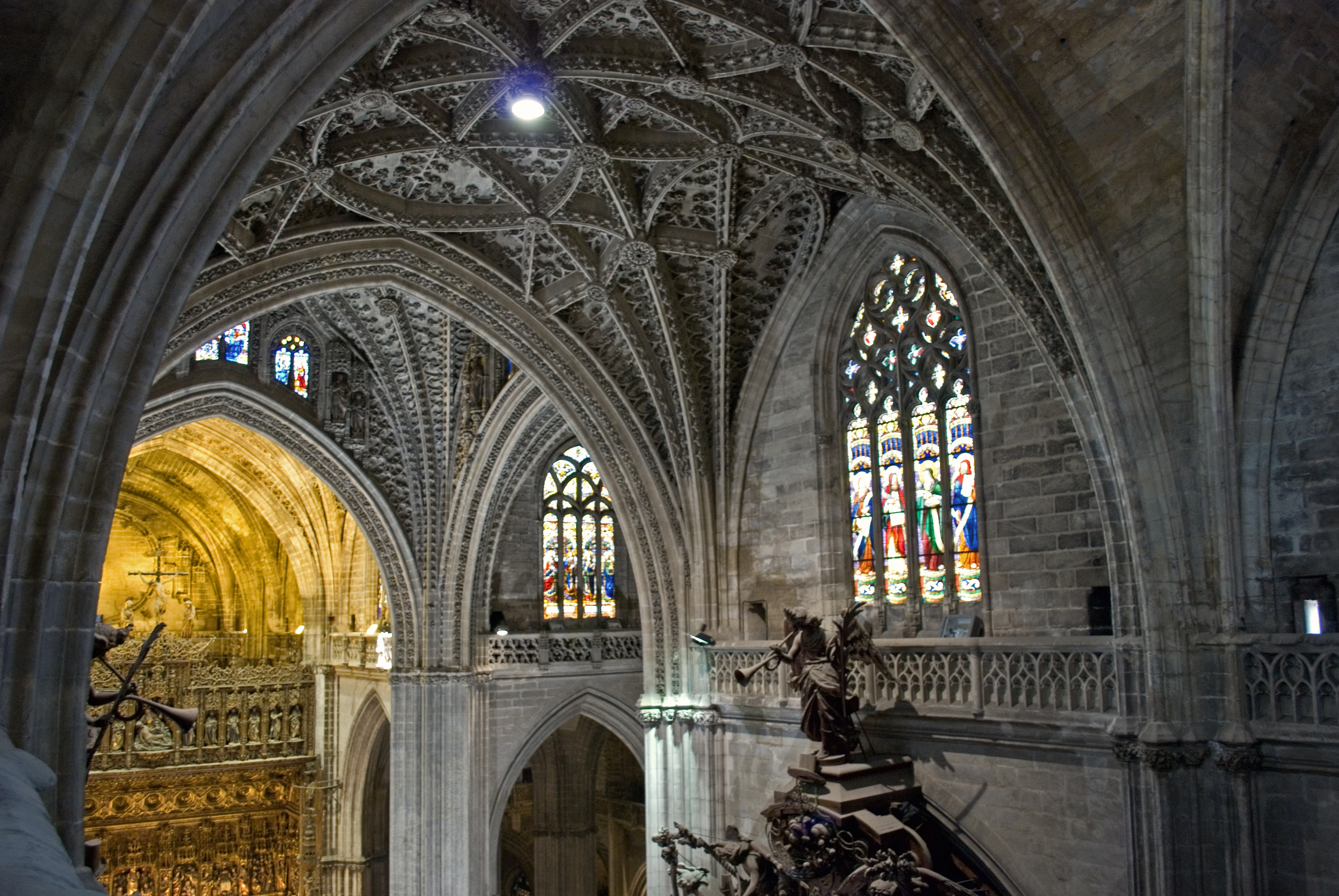 Detalle de las bóvedas de la nave principal de la catedral de Sevilla